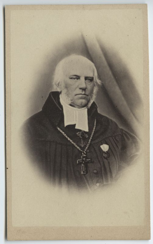 Portree: Carl Johann Koch, Hageri Lambertuse koguduse õpetaja 1835–1864